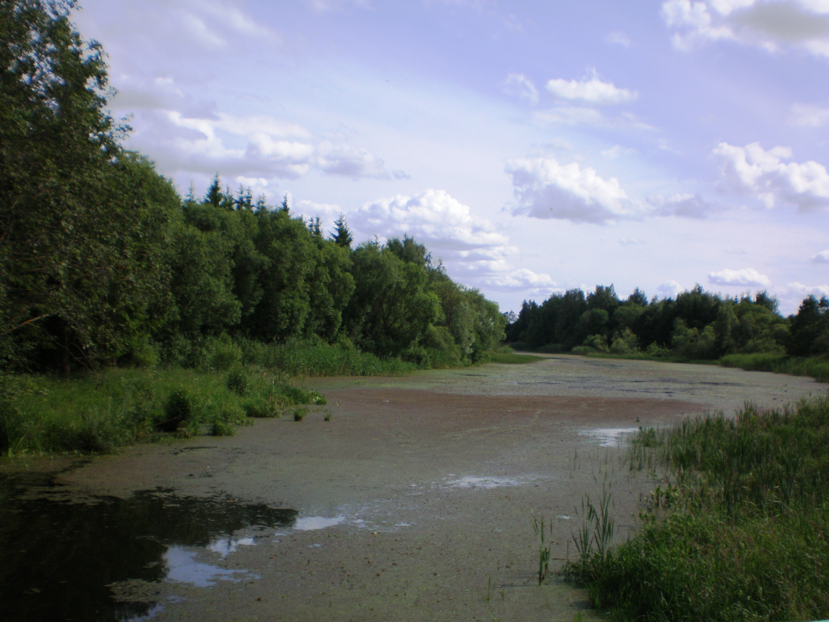 Vaidatonių tvenkinys šalia Beržų, Dotnuvos sen., Kėdainių raj.